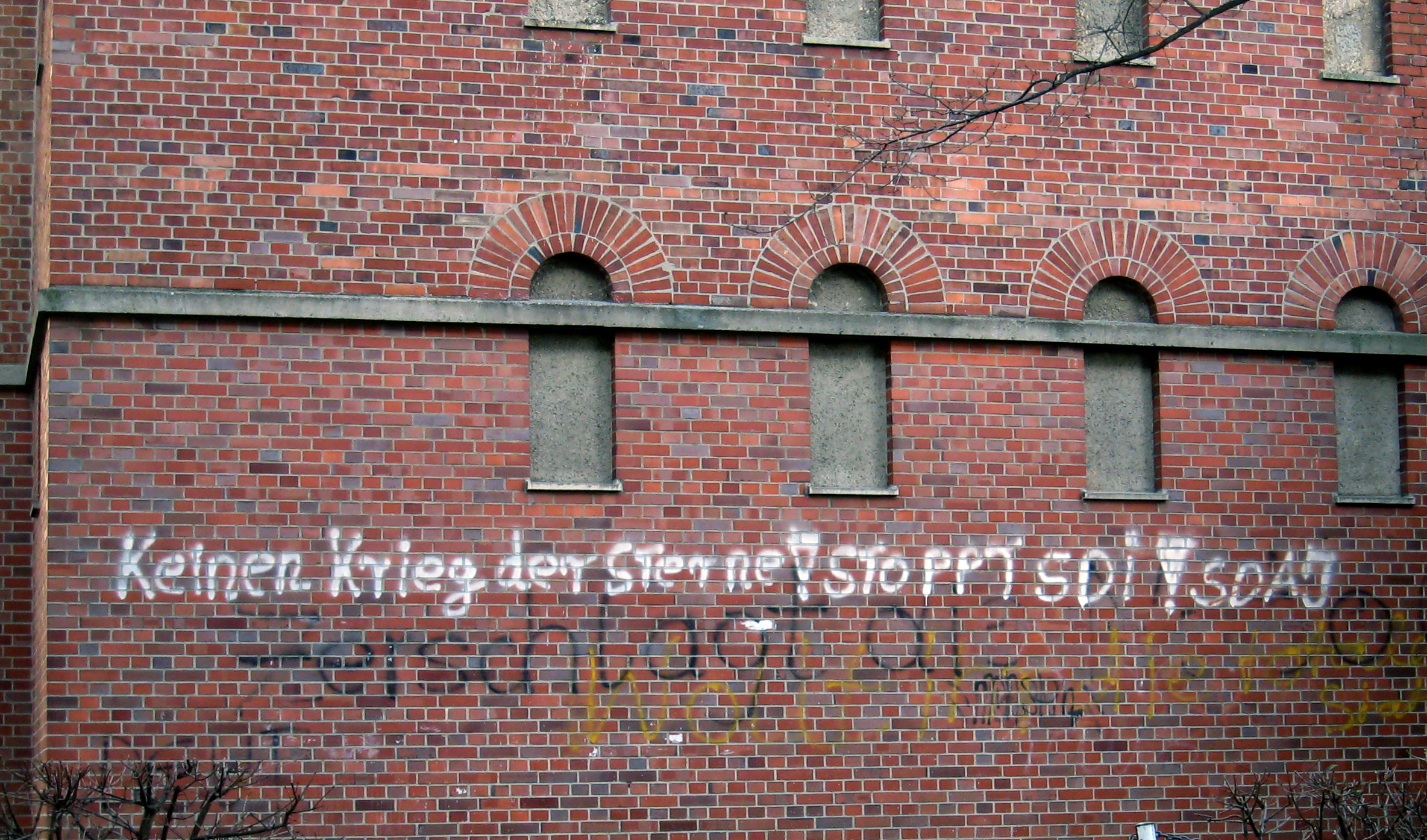 Anti-SDI graffito in Kassel, West Germany, c. 1986. "Keinen Krieg der Sterne! Stoppt SDI! SDAJ" (No star wars! Stop SDI! SDAJ [Abbr. Socialist German Workers Youth].